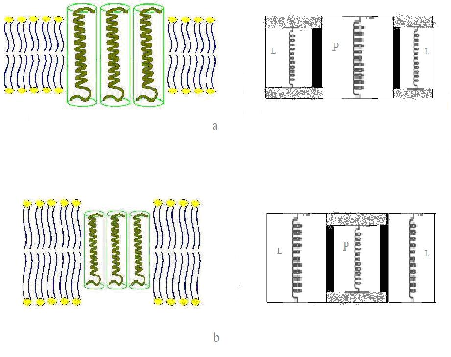 Mattress model